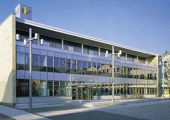 Library "Rheinische Landesbibliothek Koblenz" in Koblenz